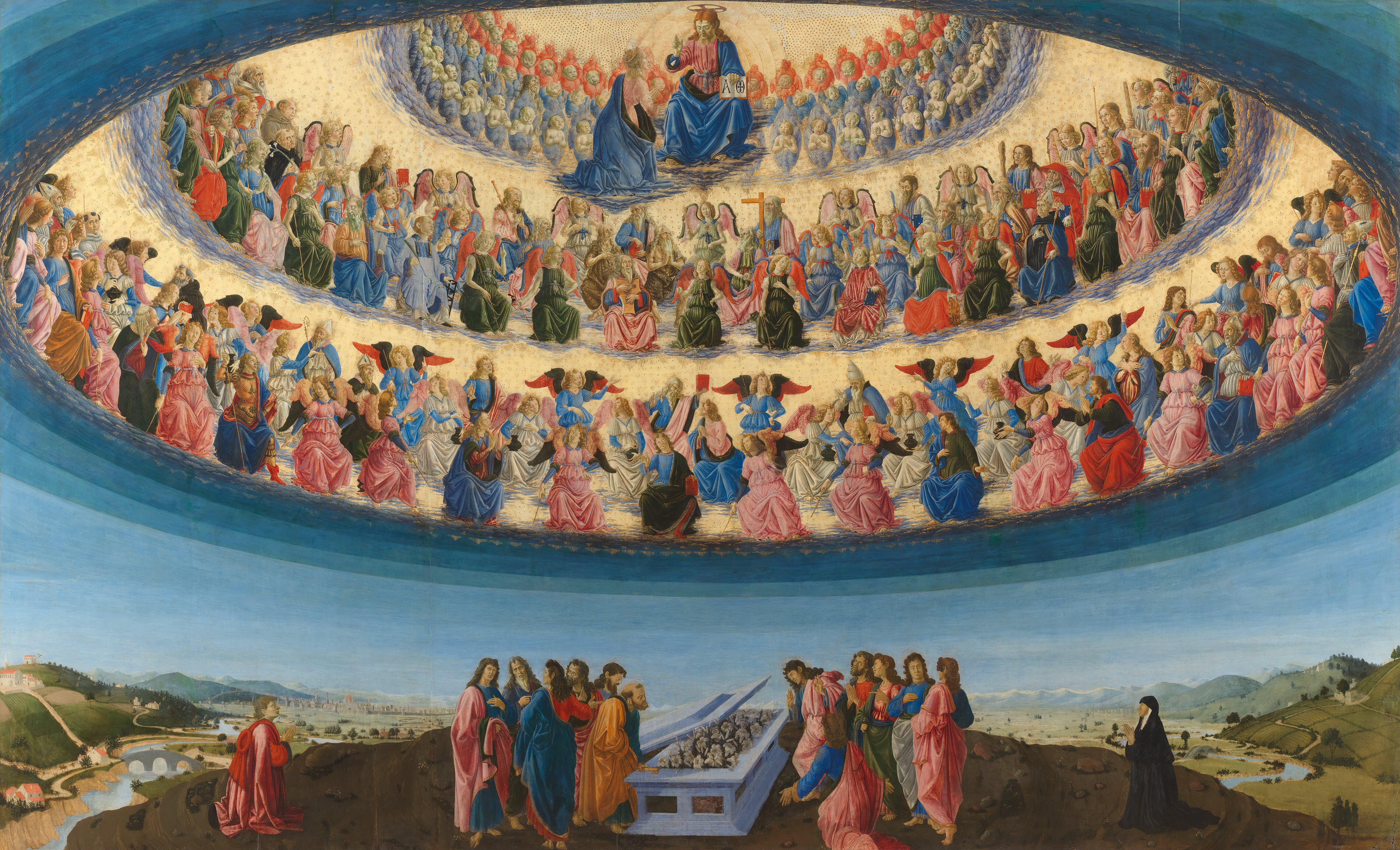 Die leibhaftige Aufnahme Mariens in den Himmel in Anwesenheit von Engeln und Heiligen, als auch der Stifterfiguren.